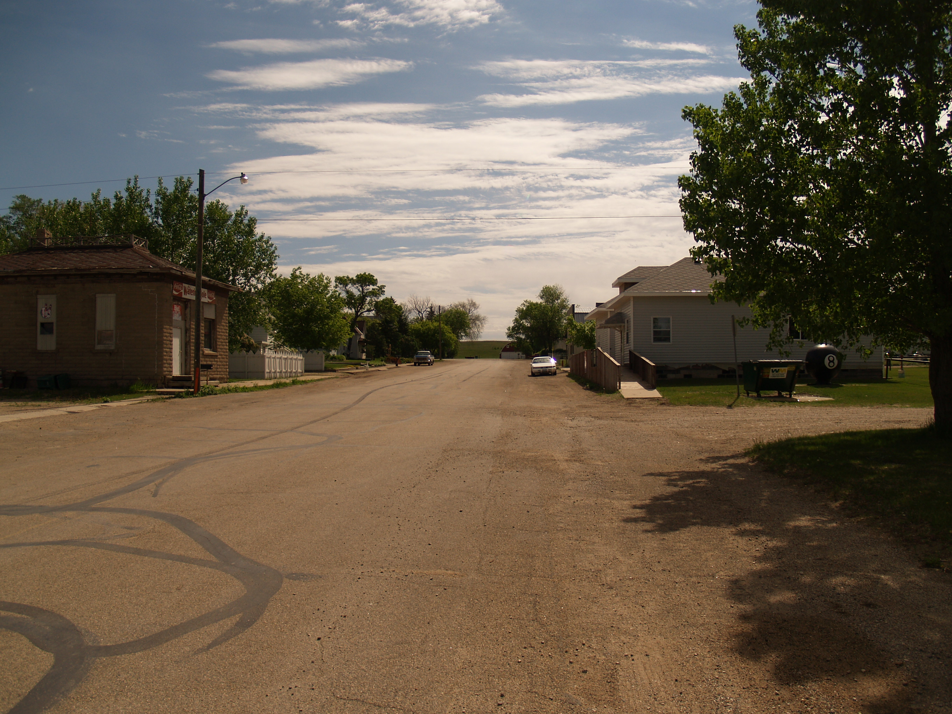 Montpelier, North Dakota